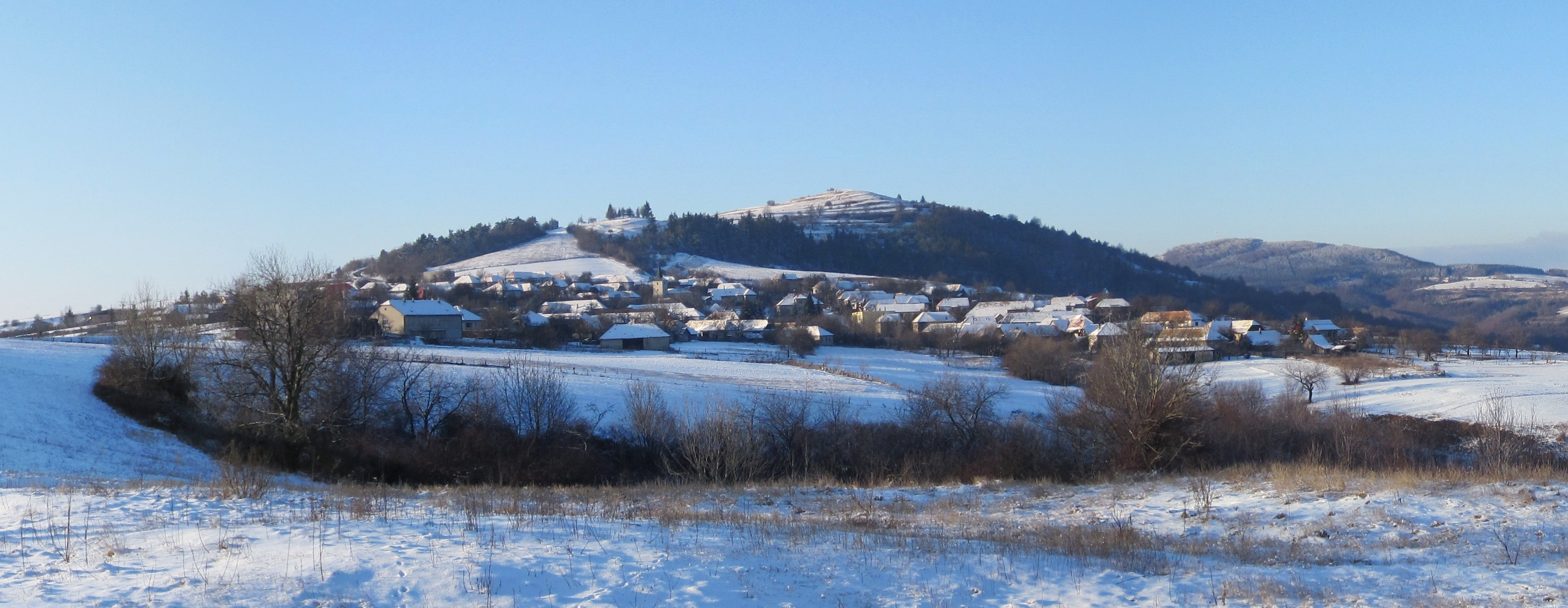 Budiná v zime